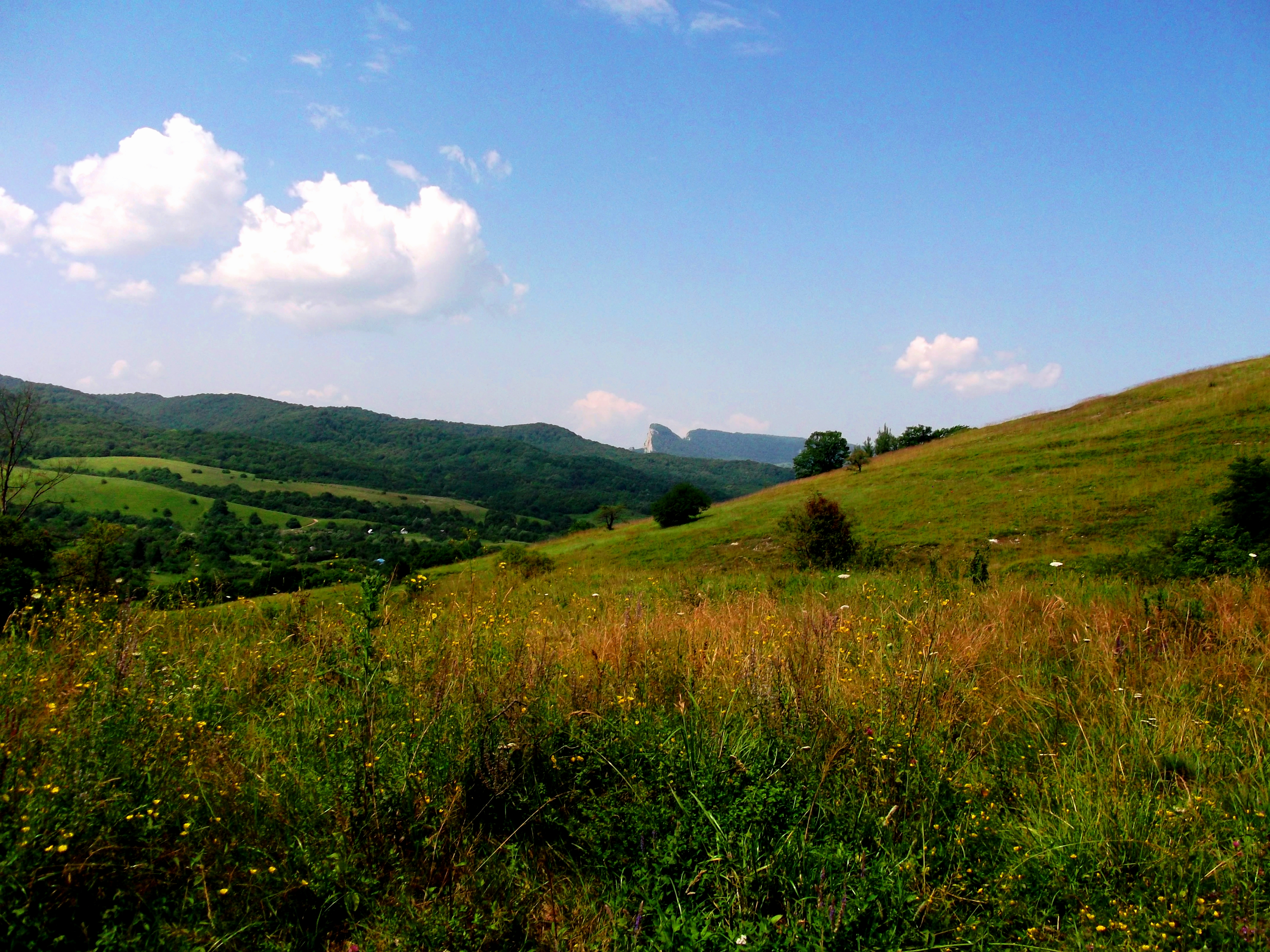 Круглое озеро, Лабинский район This image is related to the protected area of Russia number 2310215